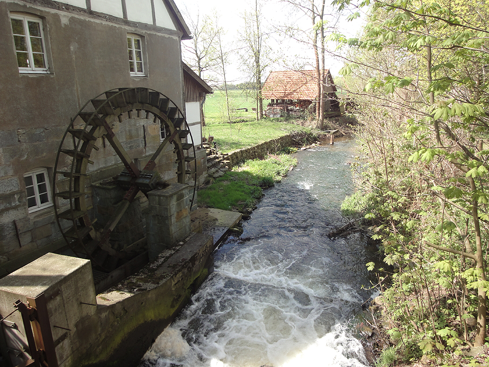 Die Delkenmühle am Neuen Ölbach bei Varensell This is a photograph of an architectural monument.